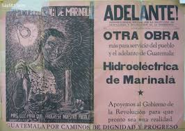 Afiche promocional de la hidroeléctrica de Jurun Marinalá